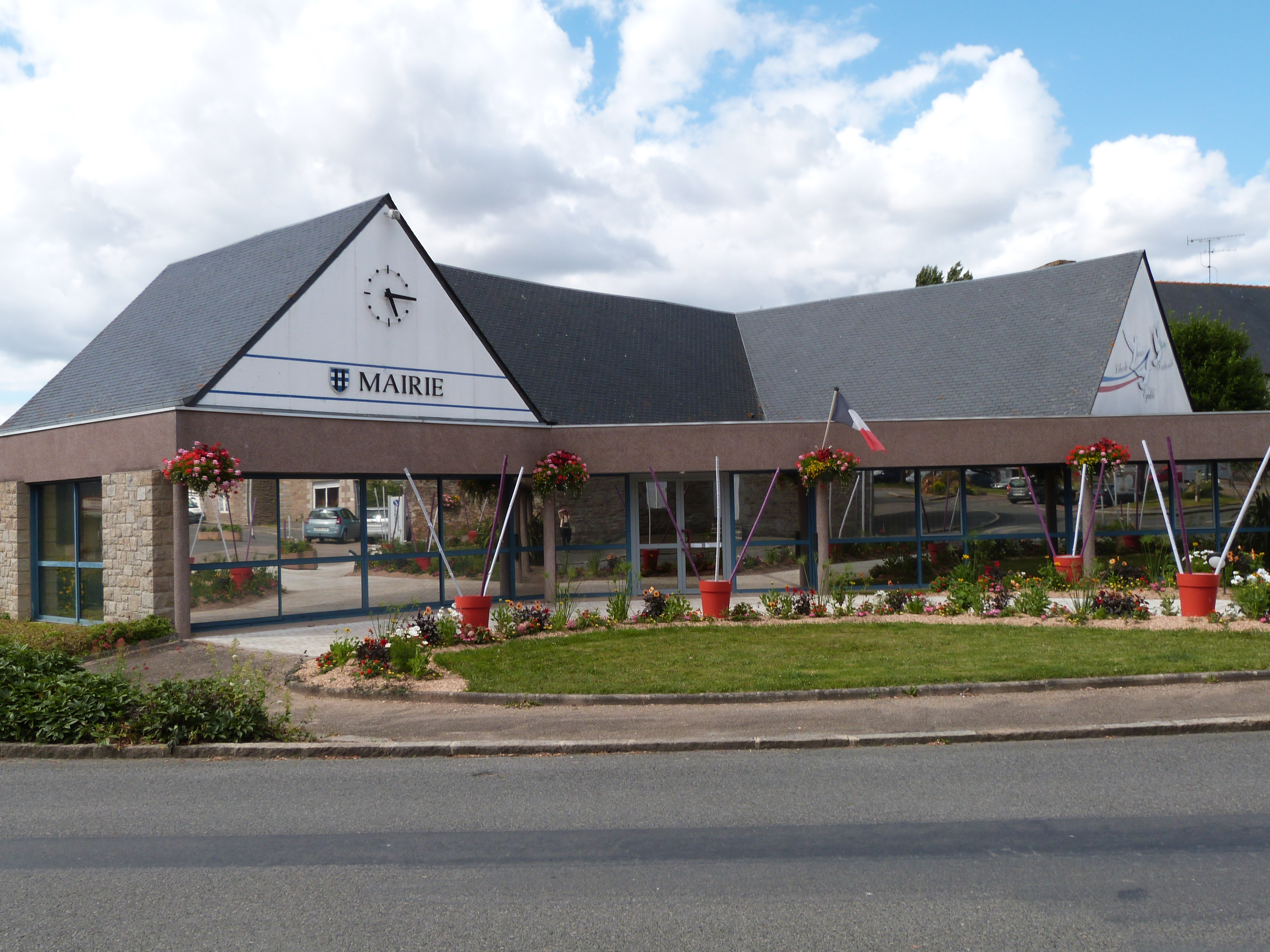 Mairie de Landéhen